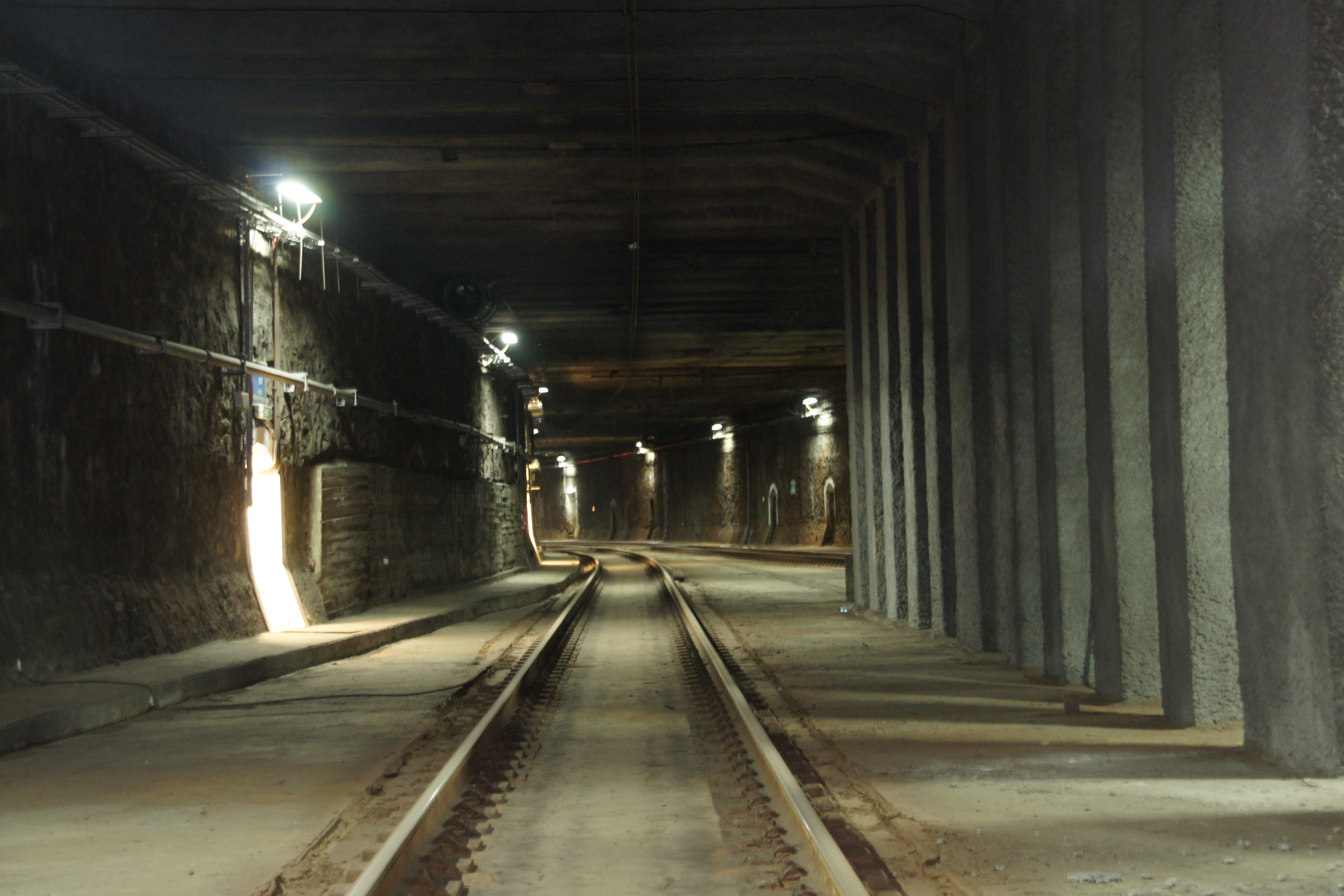 Tunel średnicowy w Warszawie - część dla pociągów podmiejskich